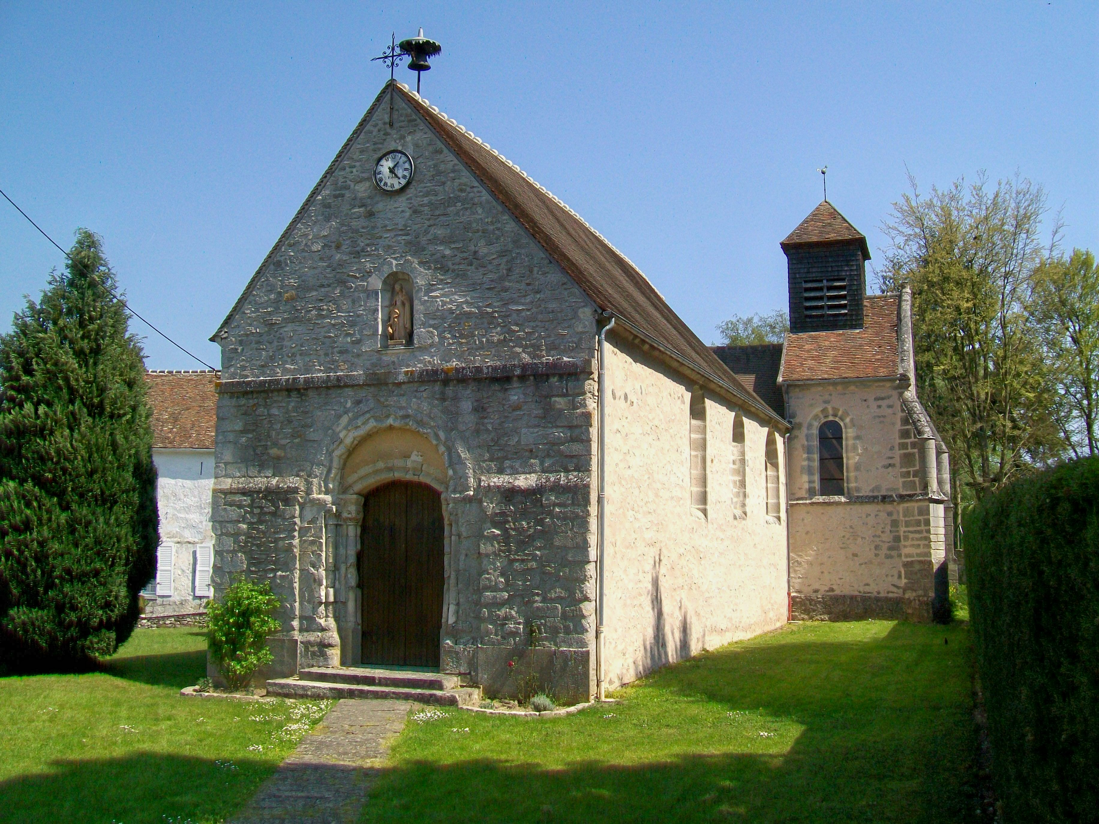 L'église Sainte-Geneviève, rue du Moulin. L'église a été rebâtie vers 1775, avec conservation du caractère roman de la nef et du portail d'origine, qui daterait du XIe siècle.